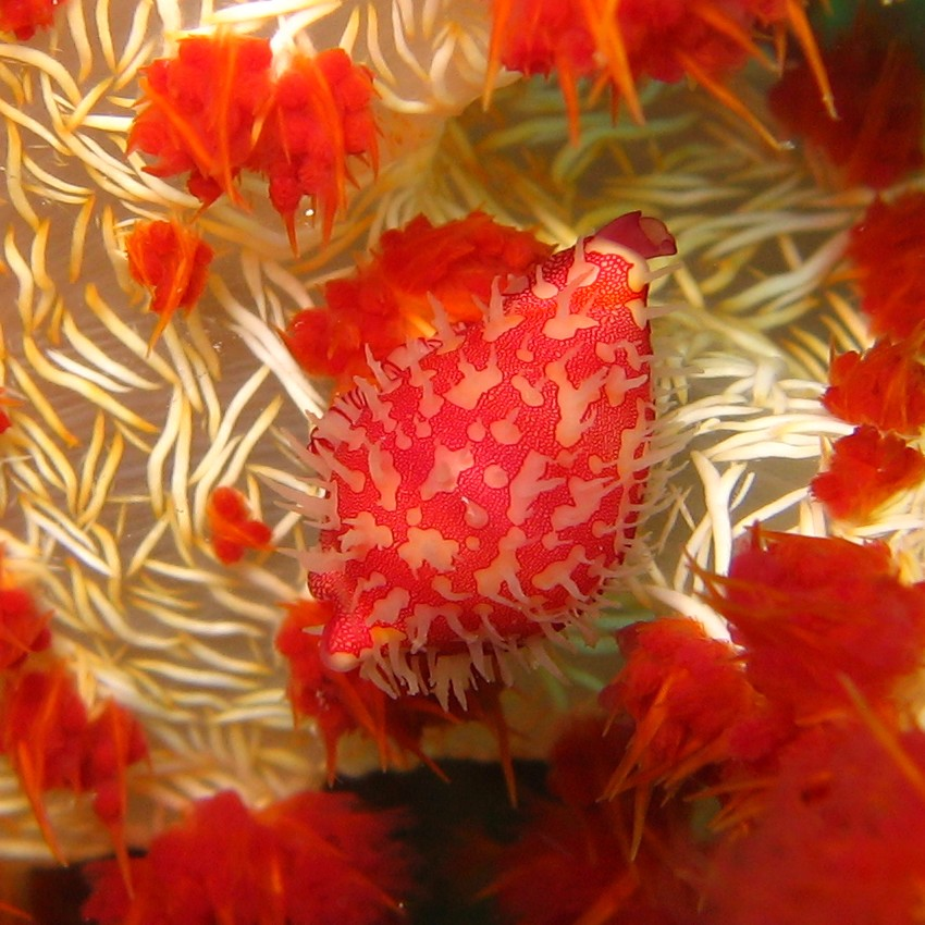 Primovula roseomaculata, Mactan Cebu, Philippines